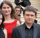 Le réalisateur et les comédiennes de Au-delà des collines au festival de Cannes